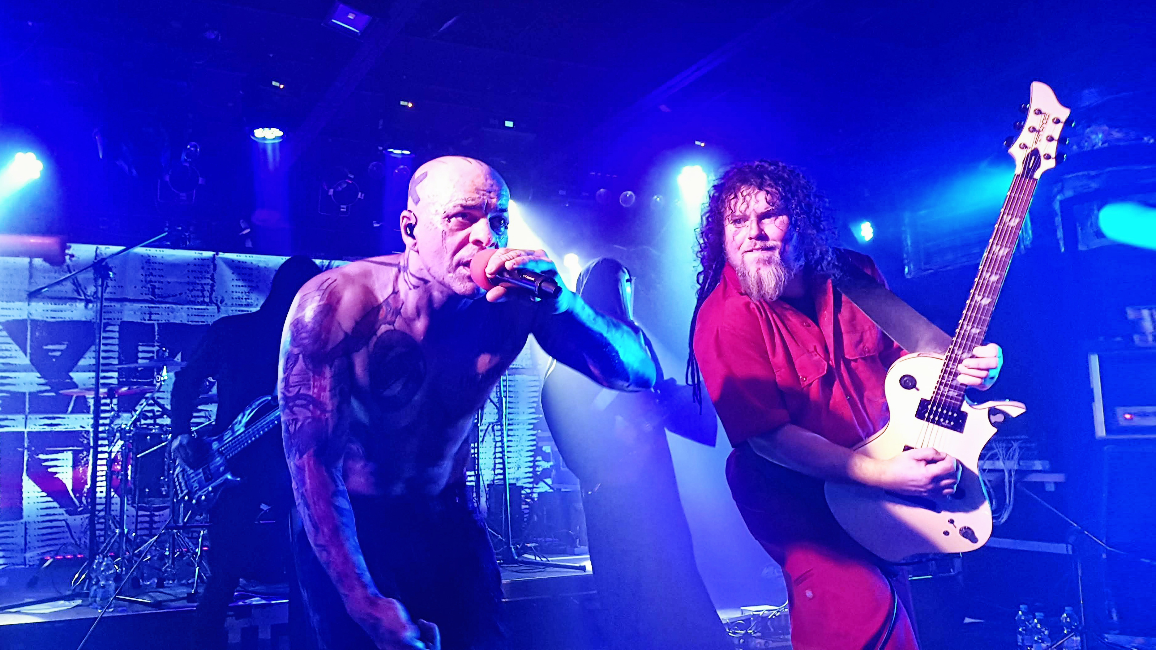 Koncert zespołu w Warszawie w grudniu 2019 podczas trasy Respect Tour